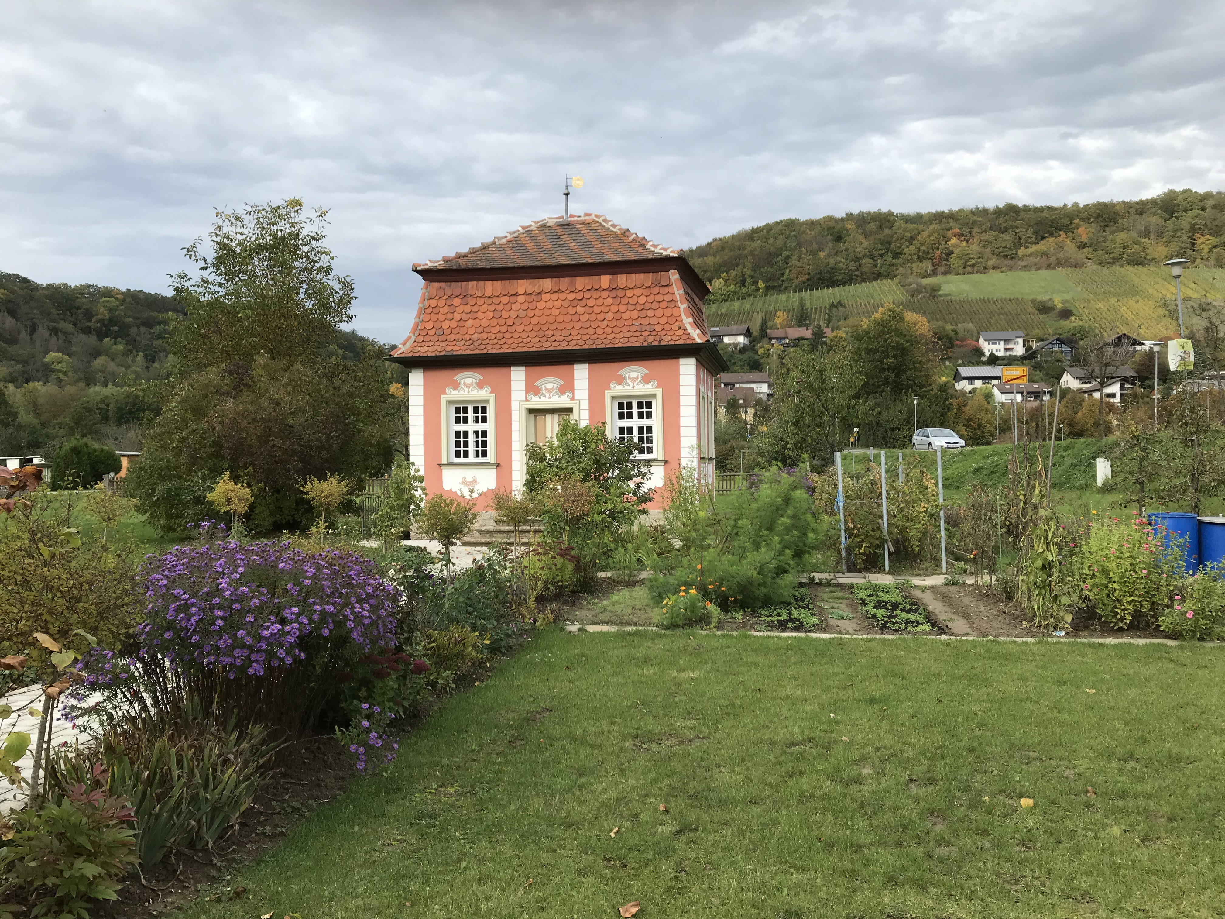 Barockes Teehaus in Forchtenberg